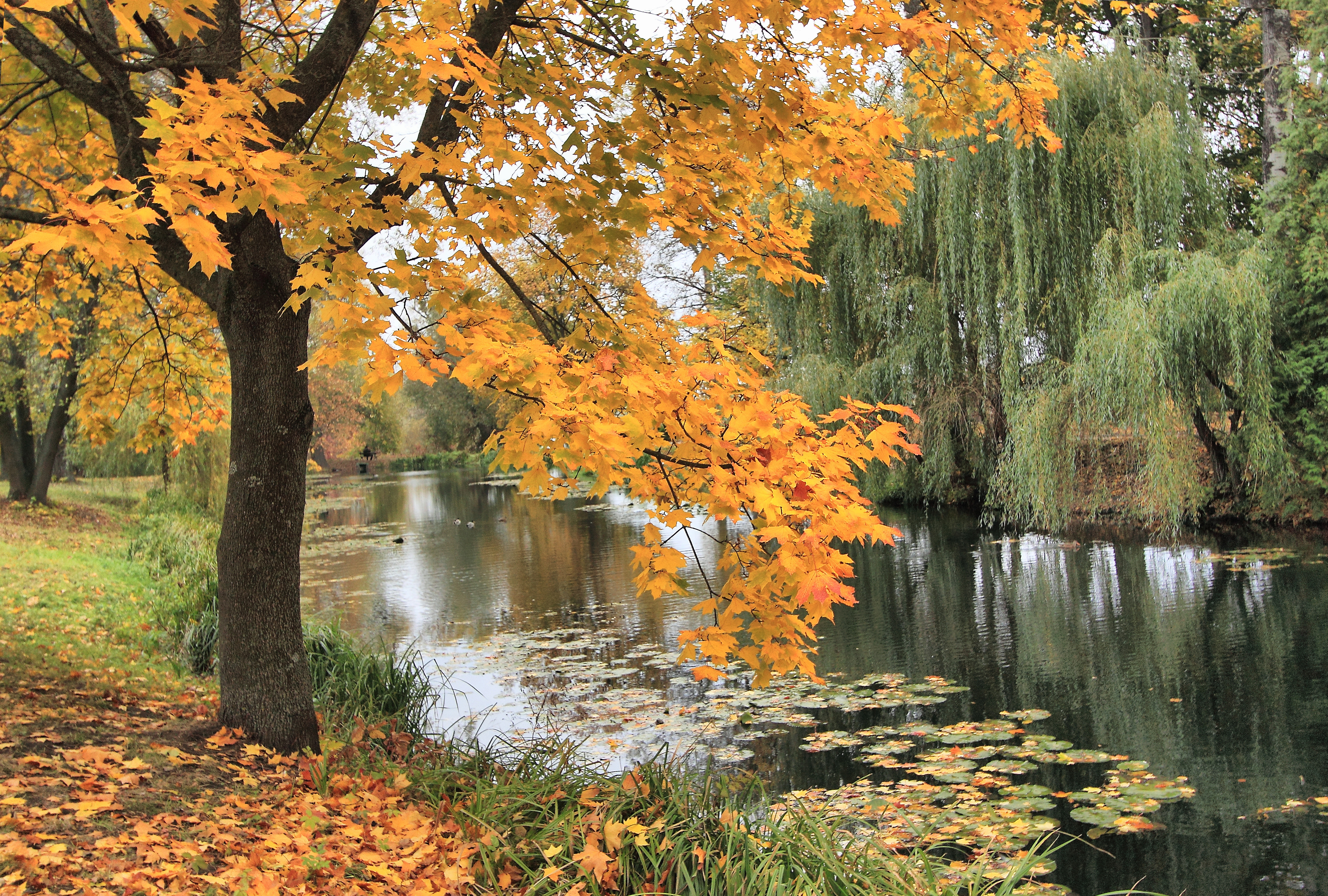 «Олександрія», Білоцерківський район, Білоцерківська міська рада, Фурсівська та Пилипчанська сільські ради